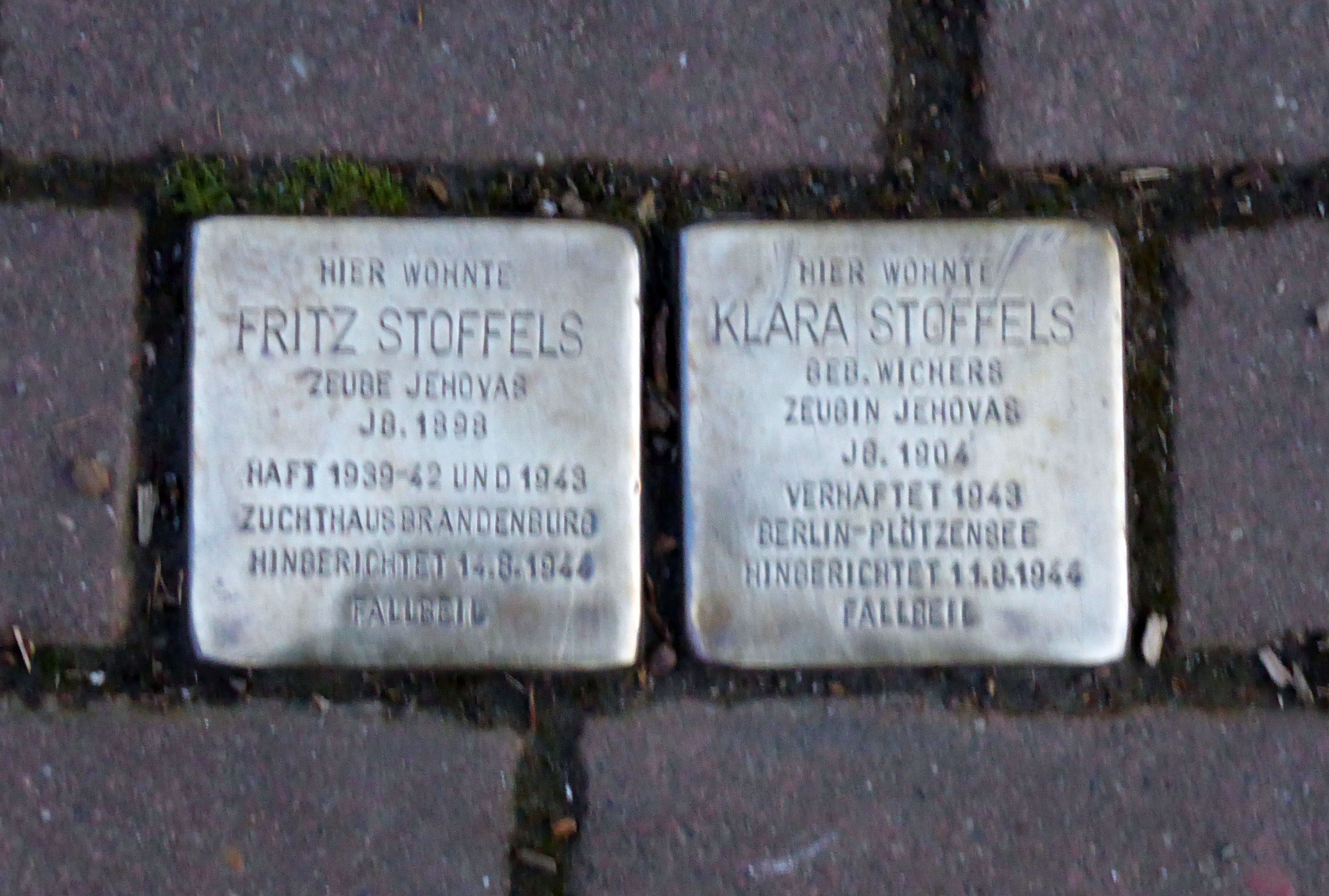 Stolperstein: Verlegestelle, Belvederestraße 147, Köln